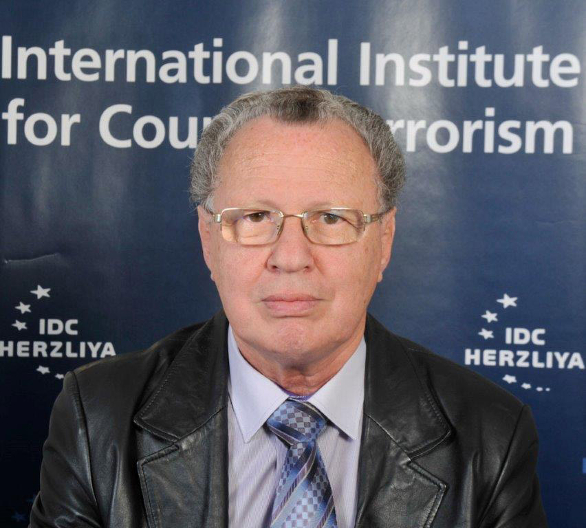 אלי כרמון - ICT